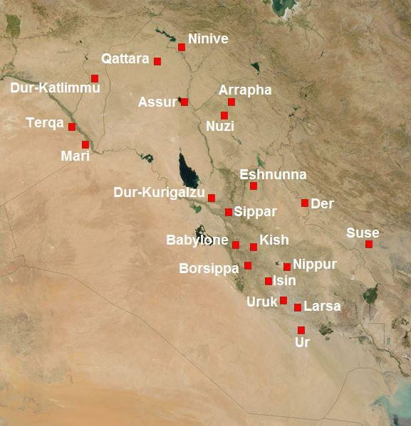 La Mésopotamie au IIe millénaire av. J.-C. Mesopotamia in 2nd millennium BC -- 2000 BC to 1000 BC